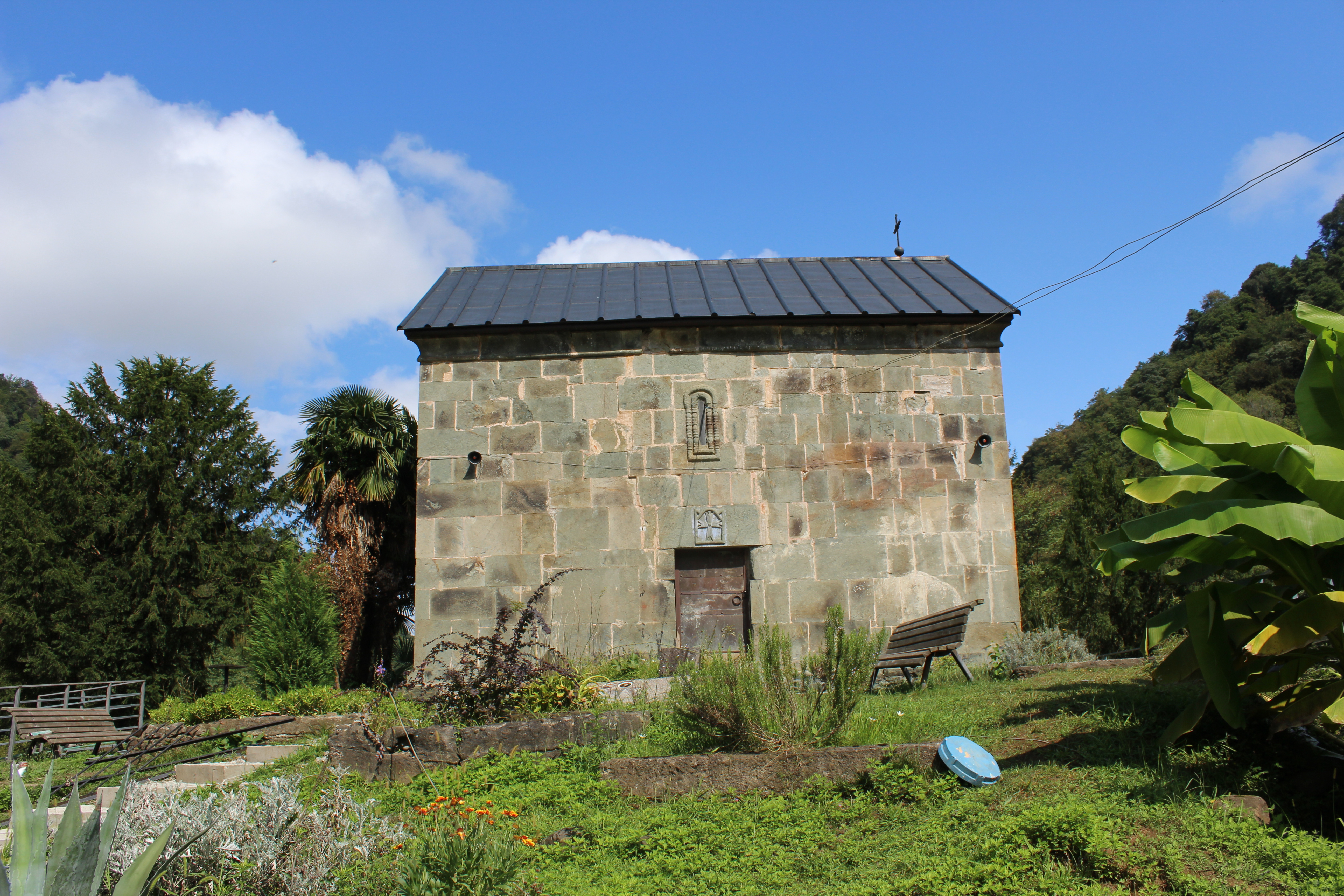 აჭის ეკლესია